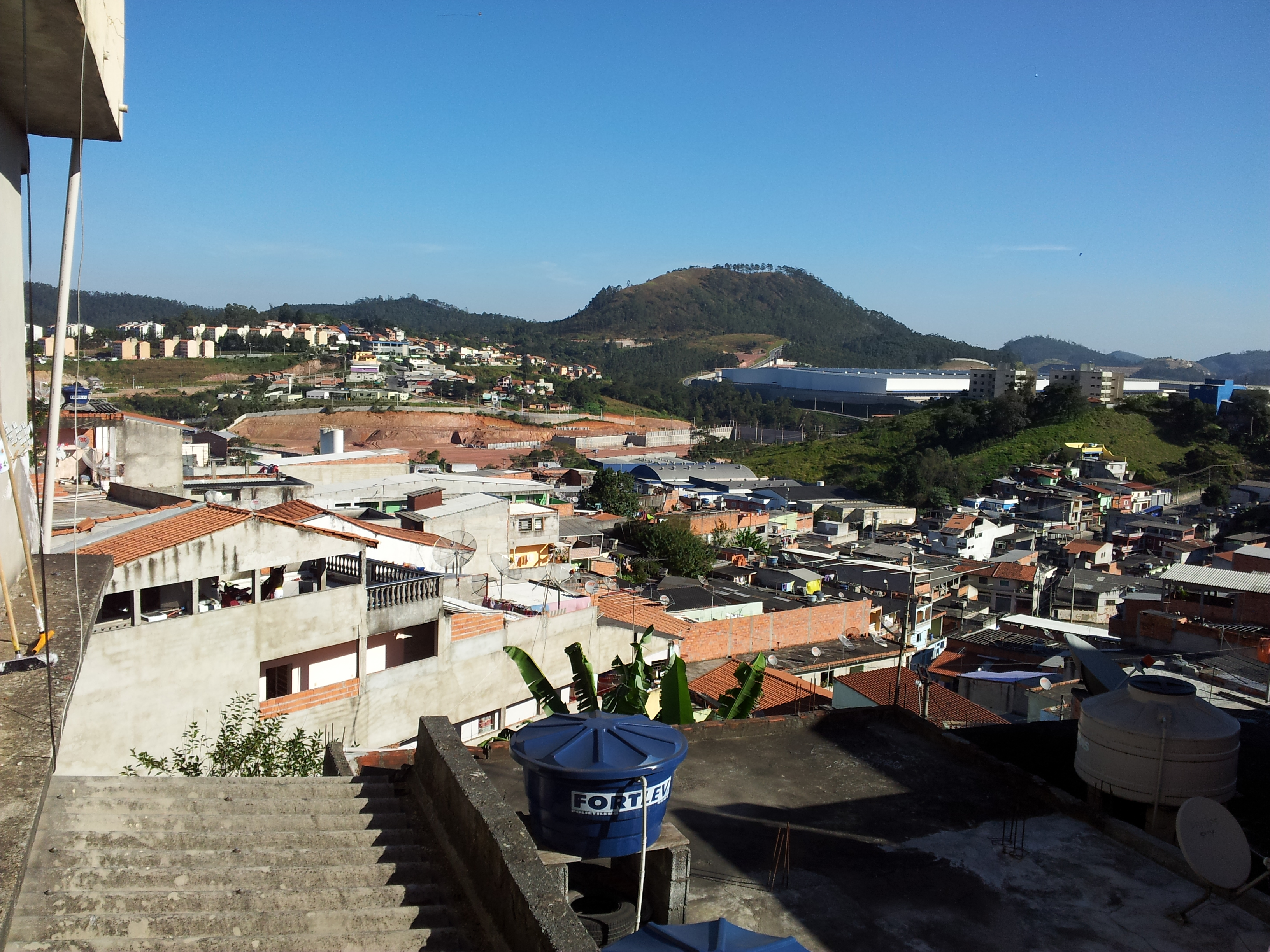 Cajamar - Jordanésia - São Paulo